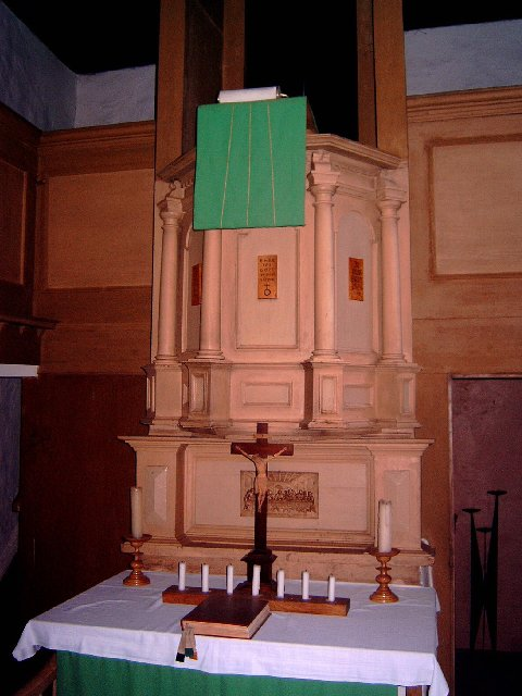 Kanzelaltar der Emmauskirche in Heuersdorf